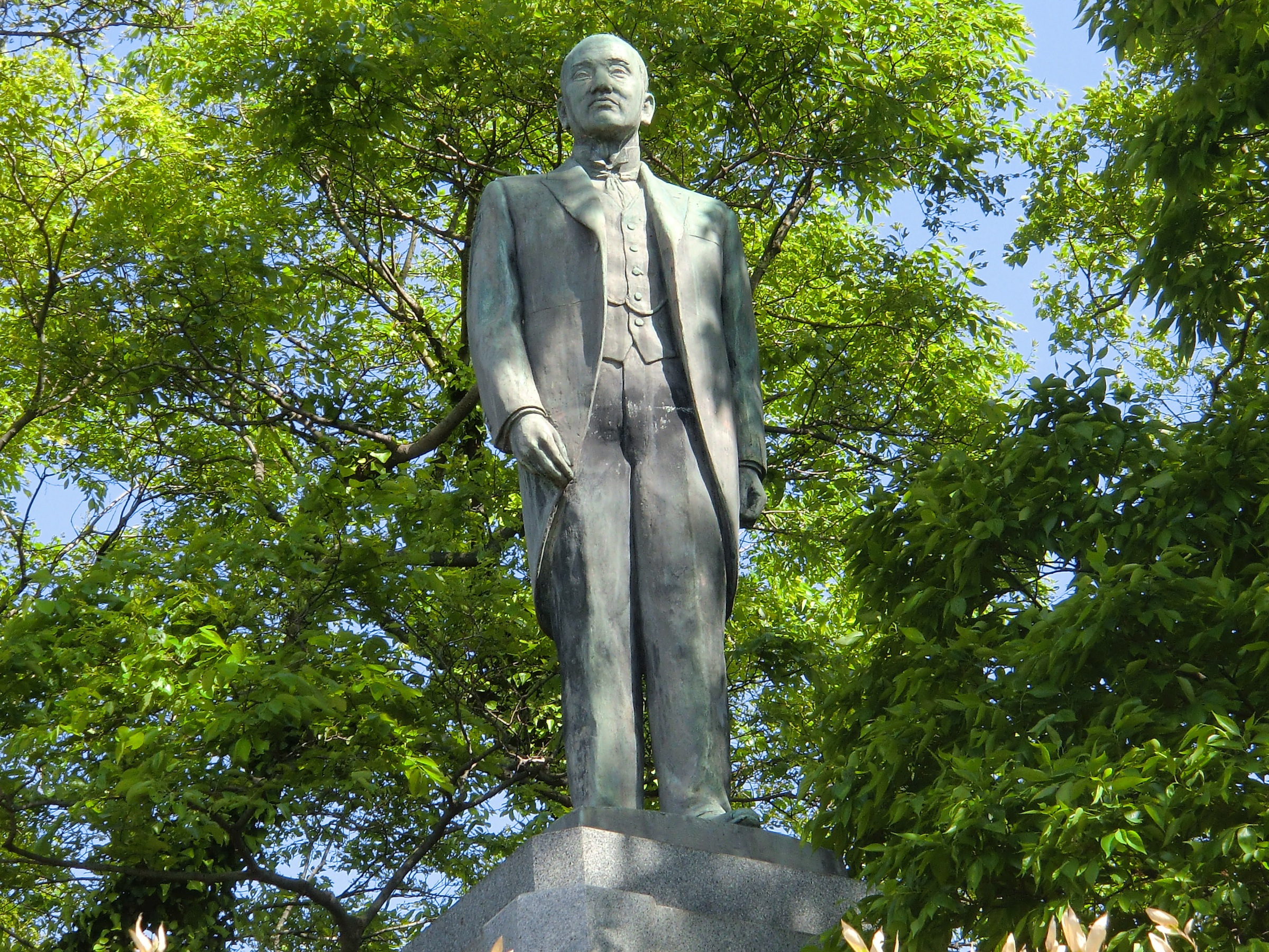 中津城公園にある小幡英之助の像（中津市）